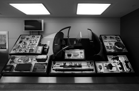 AMS製品一覧